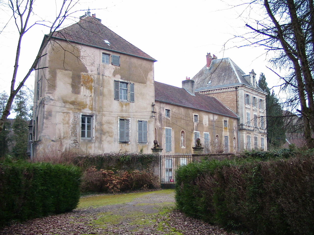 Château de Conflandey (Haute-Saône), façade côté cour et entrée